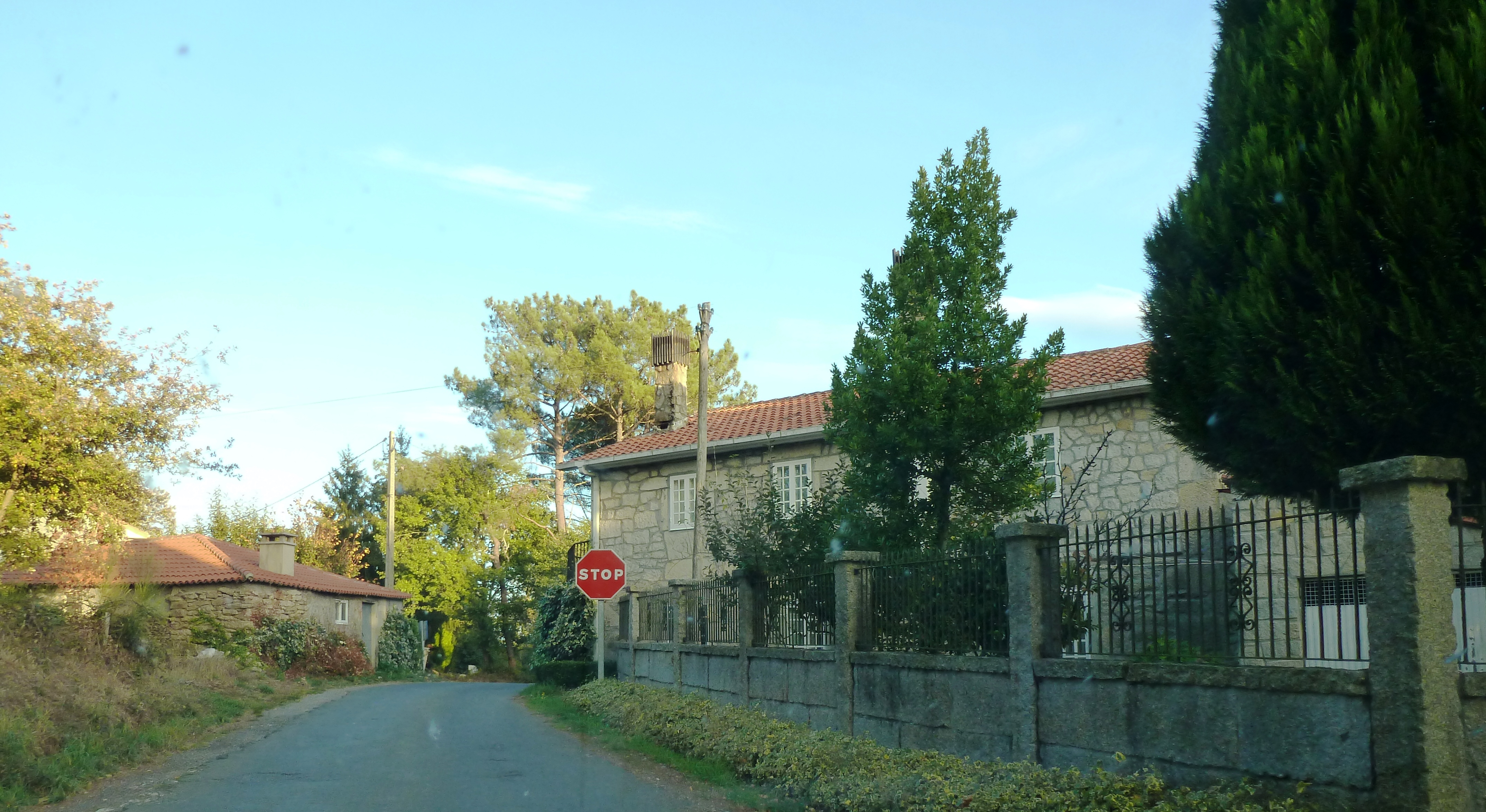 O Piñeiro, Lobelle, Carballedo